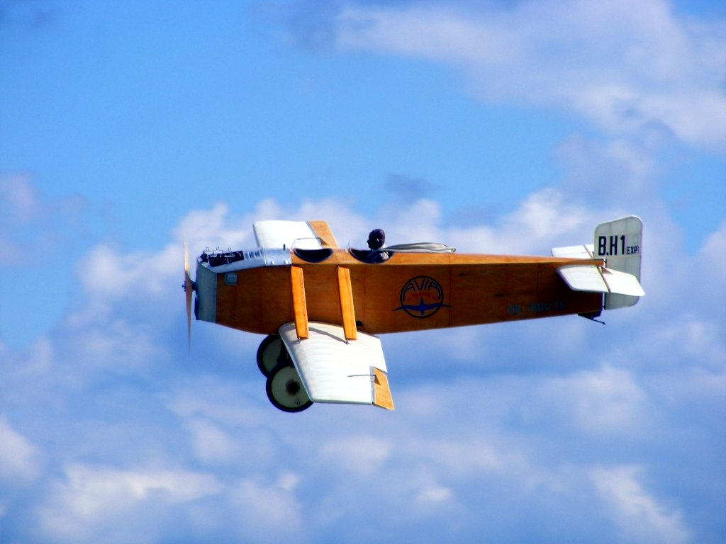 Letecký den v Chebu dne 24.8.2008